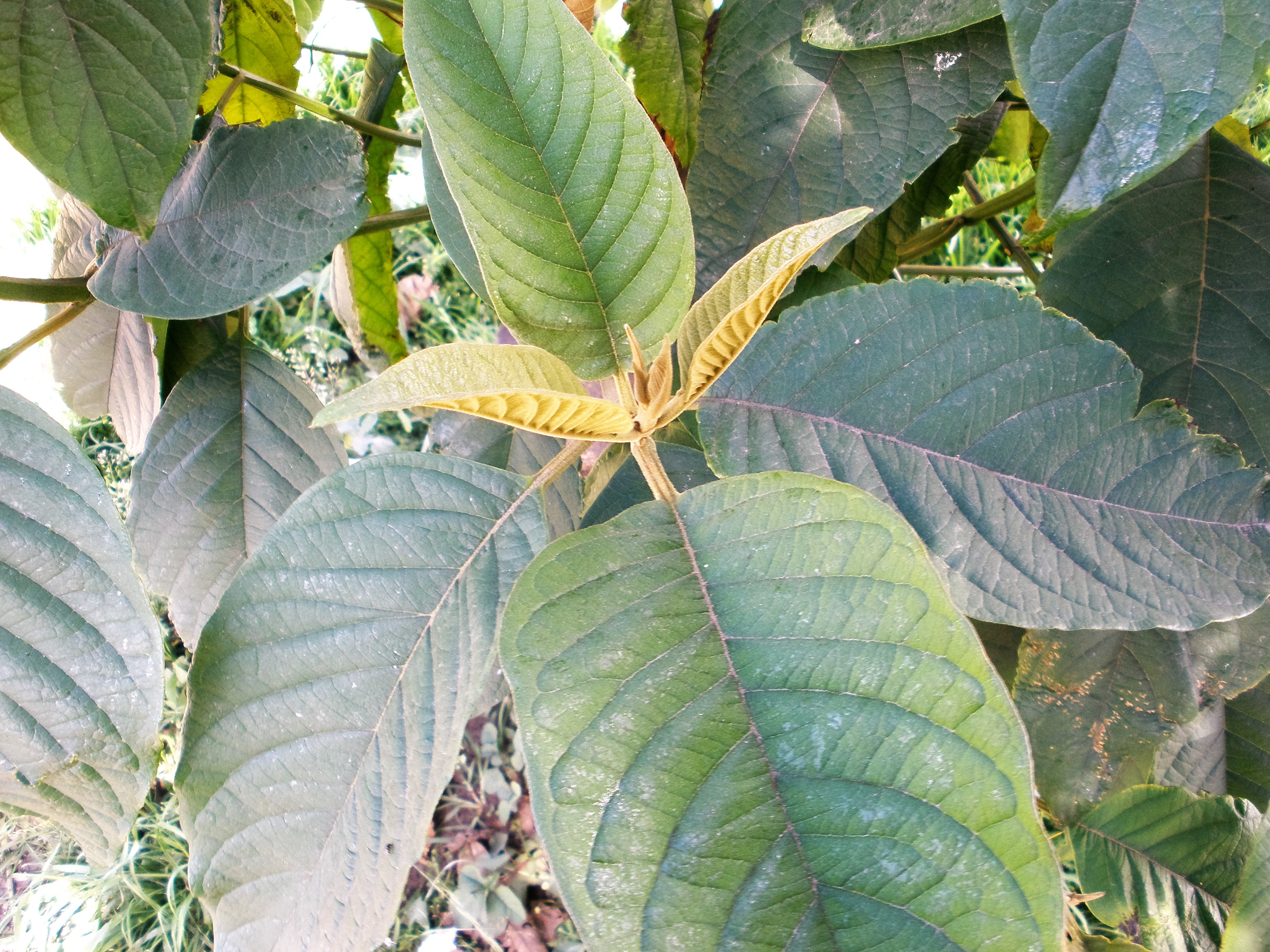 Hojas de Citharexylum subflavescens